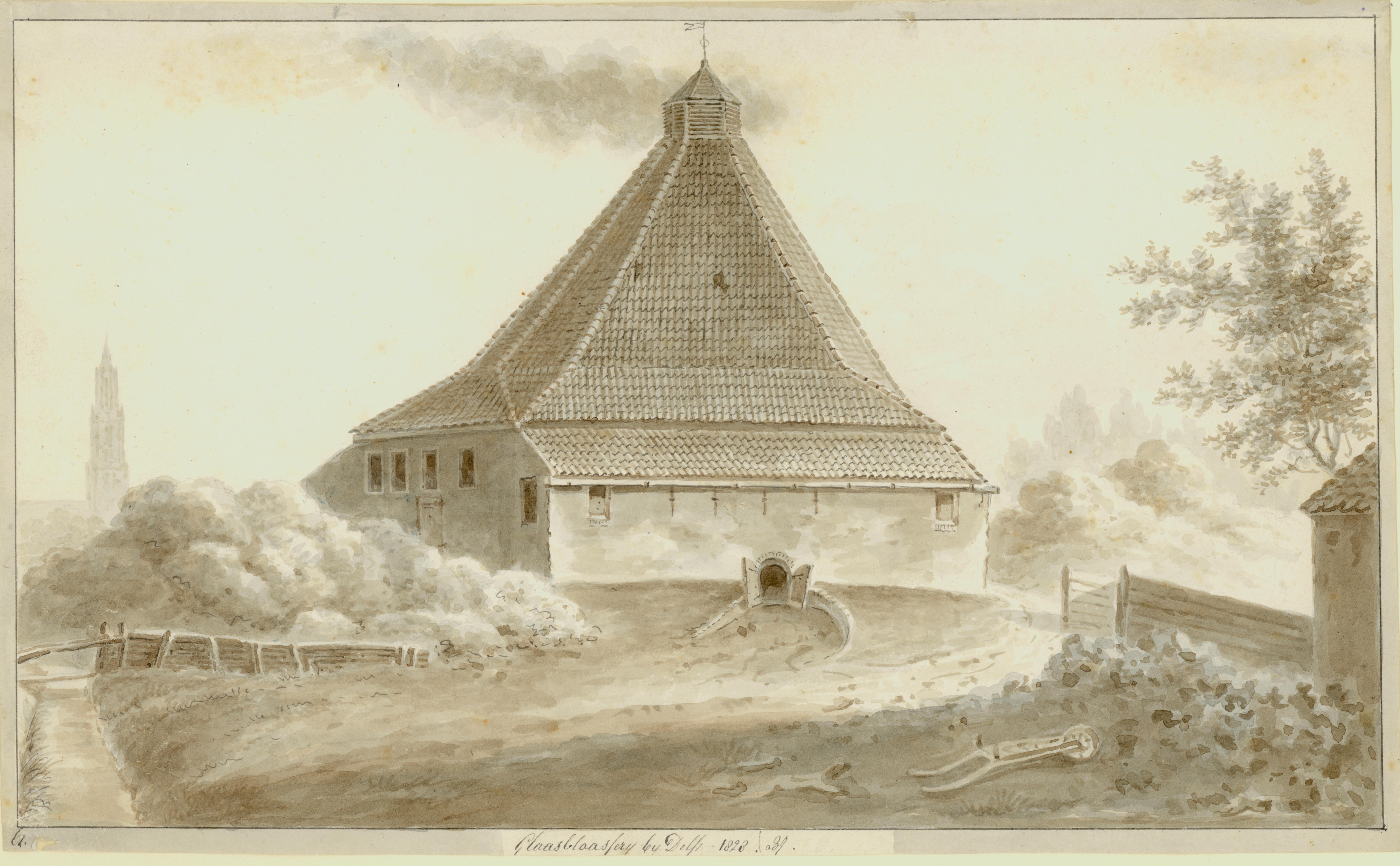 Een glasoven van een glasfabriek of glasblazerij aan de Haagweg met links op de achtergrond de toren van de Nieuwe Kerk. Sepia op papier